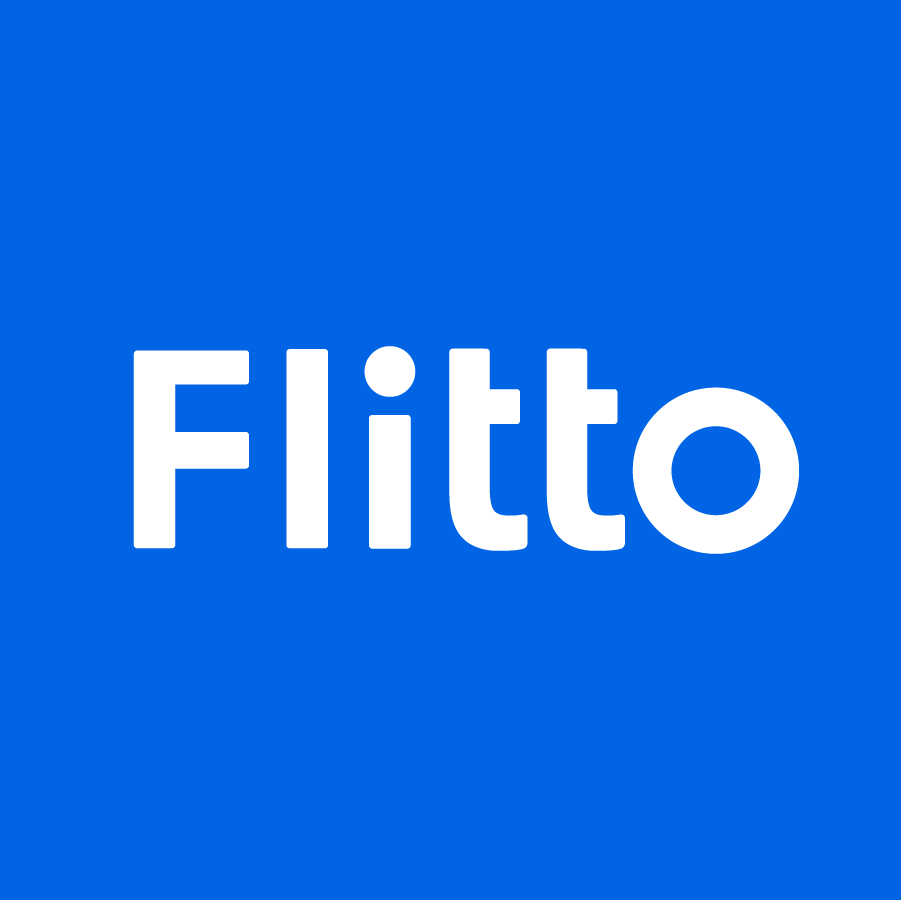 로고변경